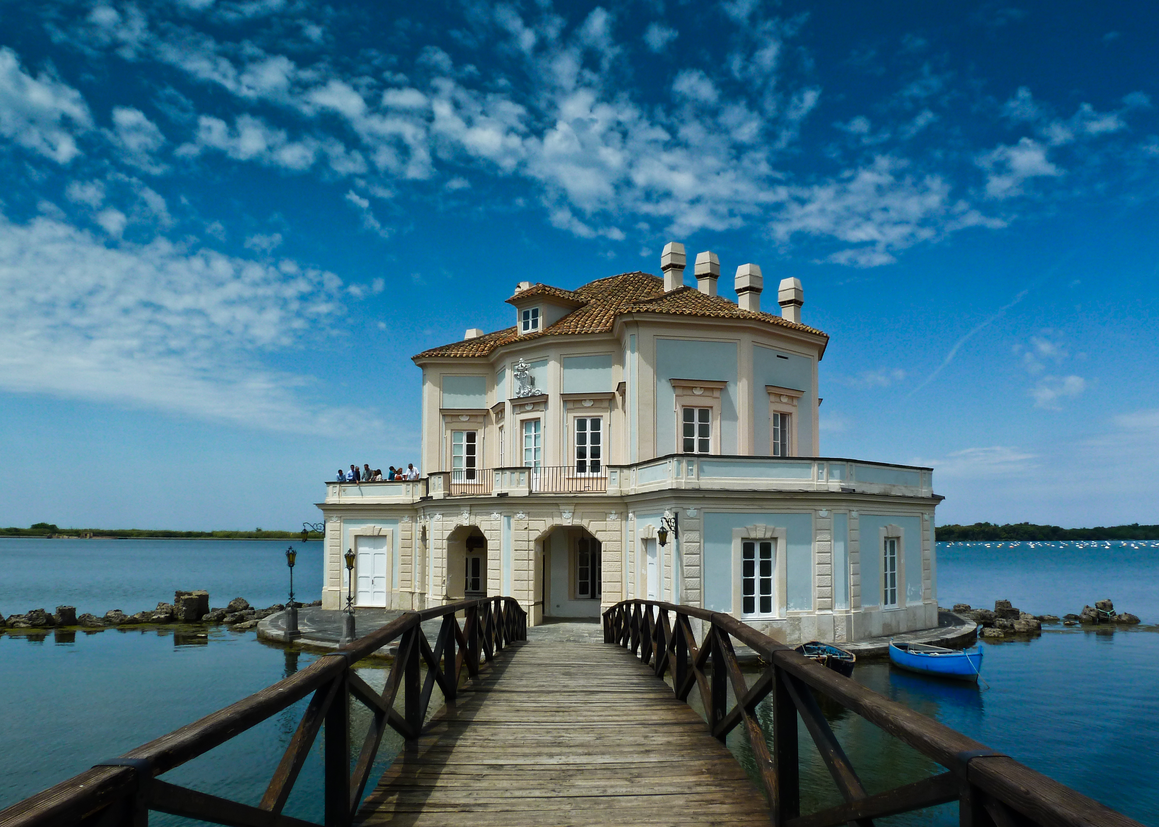 Casina Vanvitelliana - Bacoli (Na)